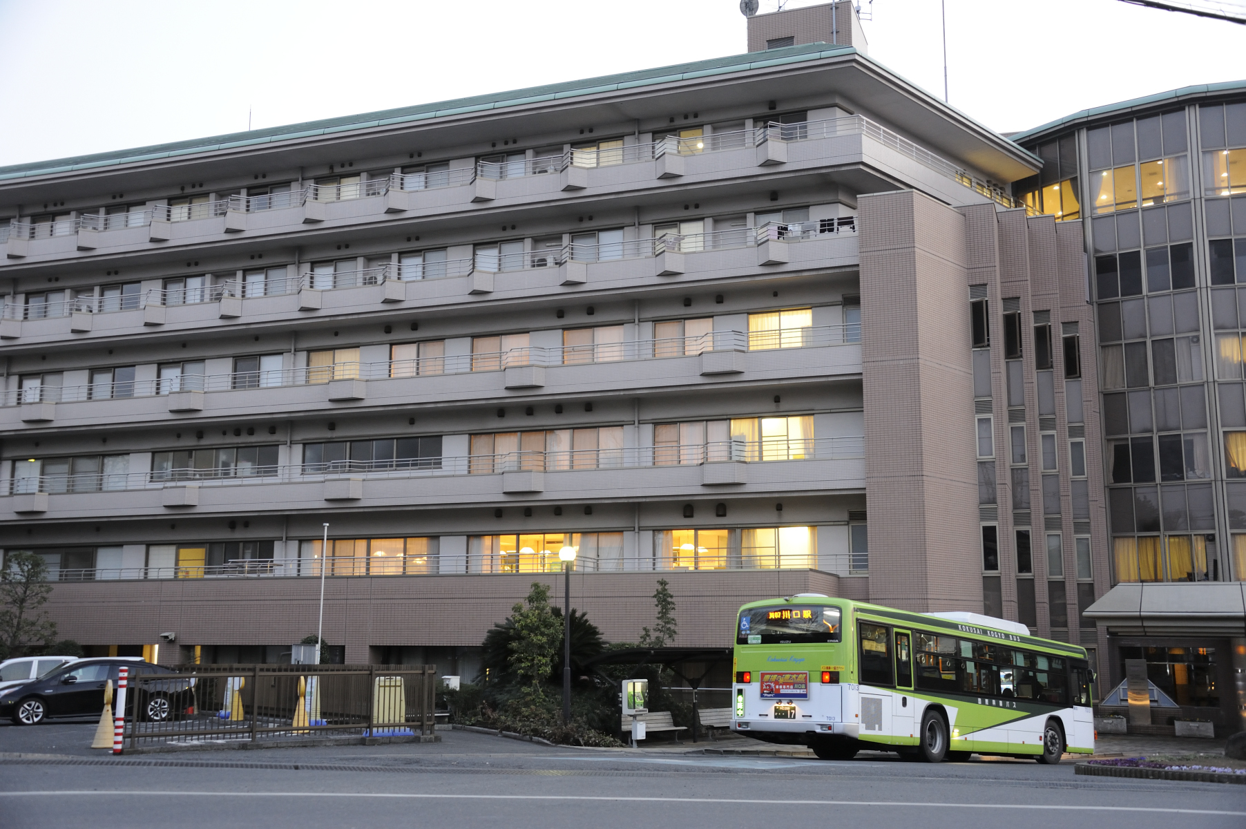 国際興業バス「川07」系統の終着、サンテピア